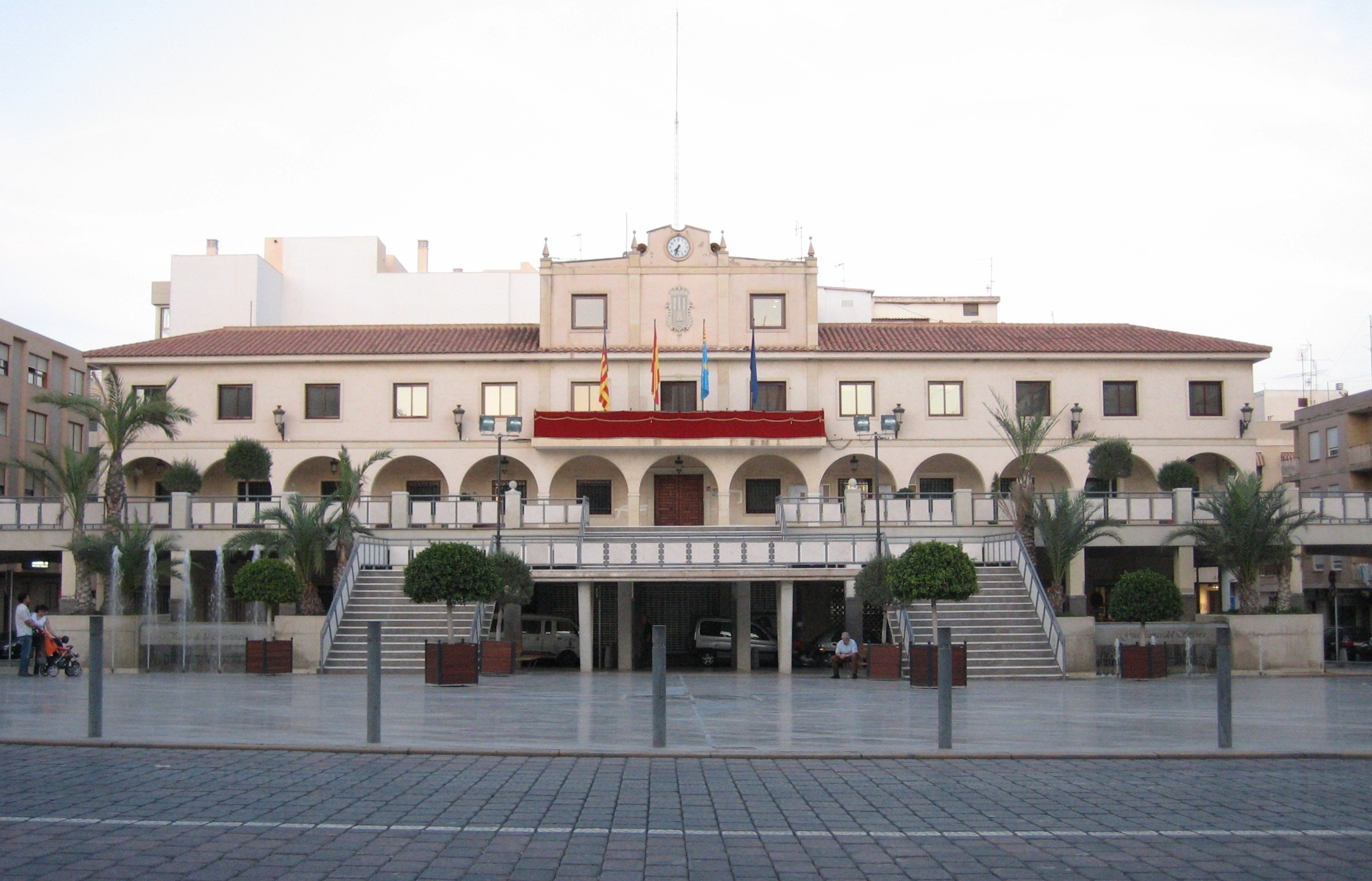 Vista del Ayuntamiento de Guardamar del Segura (Alicante, España). Autor: Rodriguillo Fecha: 15/10/2006